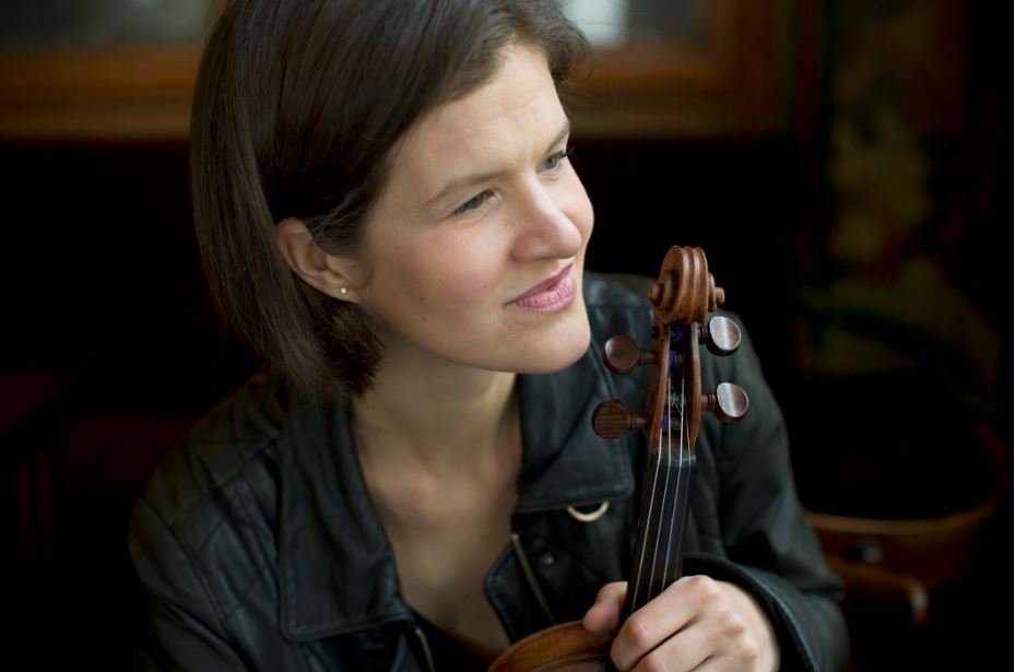 Crédit photo : JB Millot